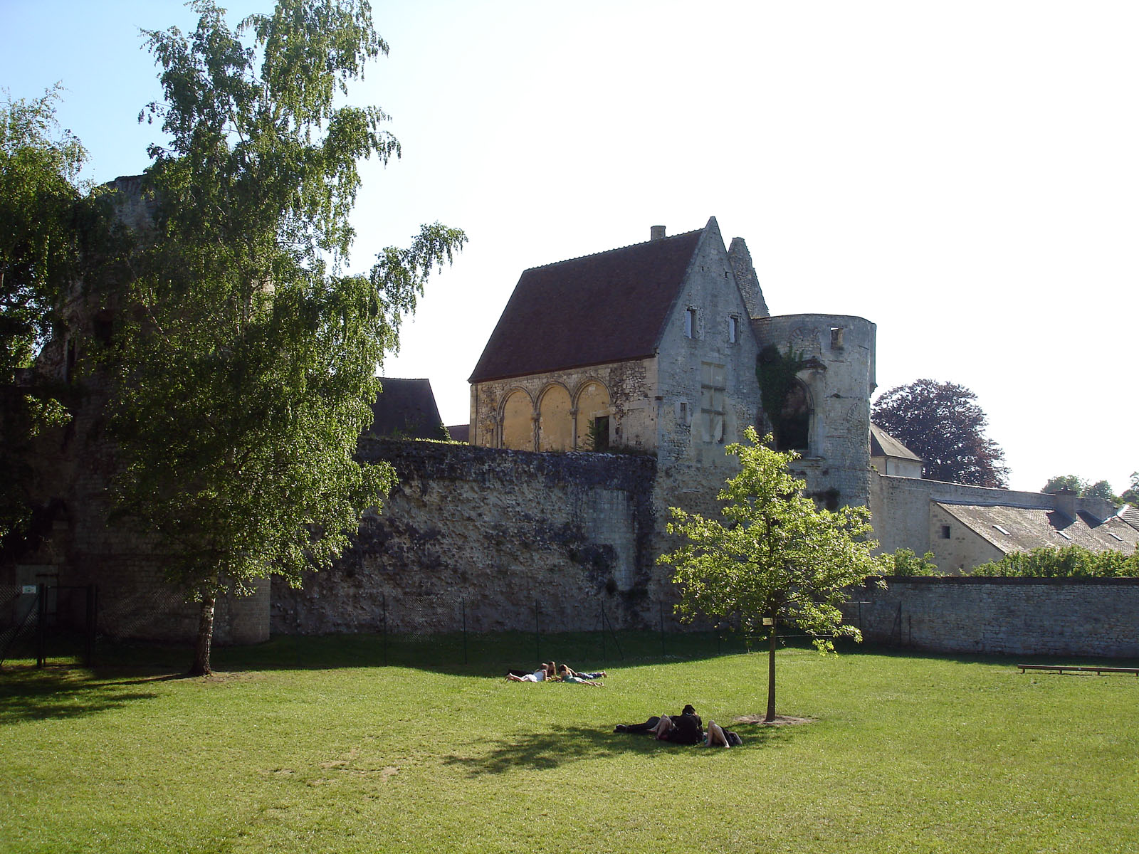 Le jardin du Roy à Senlis, Oise, France. Au fond, le rempart du IIIe siècle, et une partie des vestiges du château royal : anciens appartements privés du roi et oratoire de Charles V, dans la tour n° 28 de l'enceinte gallo-romaine, dite « tour de l'Oratoire .